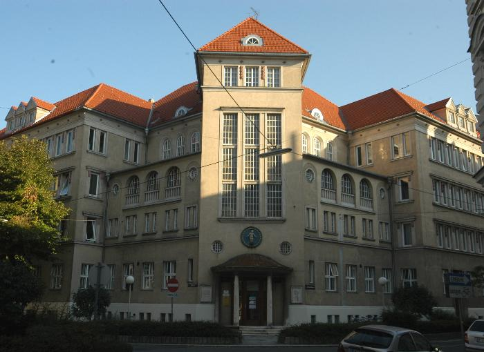 ehemalige Kinderübernahmestelle in Wien-Alsergrund, heute Julius-Tandler-Heim